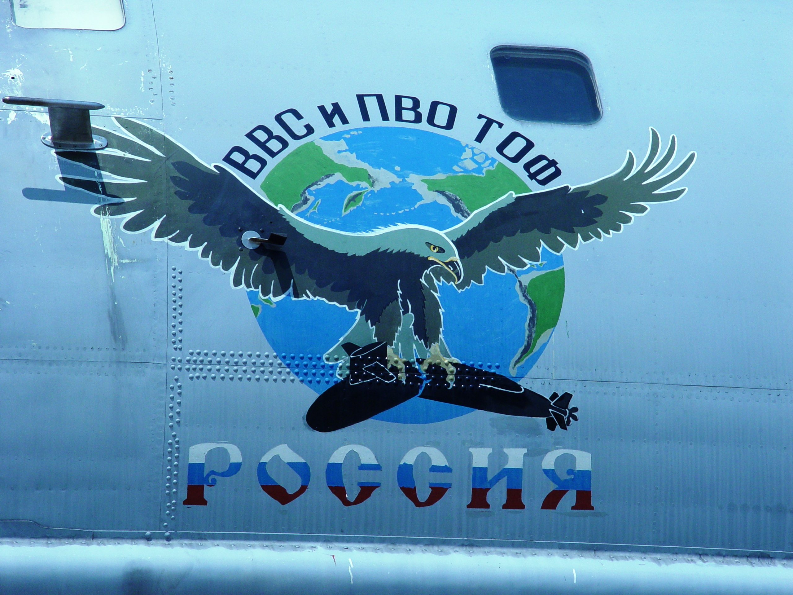 Эмблема противолодочной эскадрильи Монгохто